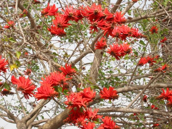 בחודש אפריל, במהלך הפריחה העץ מלבלב. על פטוטרת העלה התלתני ועל המשך ציר העלה בולטים 2 זוגות גביעים זעירים המלאים בנוזל שקוף ומבריק, אלה צופנים חוץ-פרחיים העשויים לספק תגמול לאוכלוסיית נמלים שתשמור על הצמח מפני חרקים מזיקים.